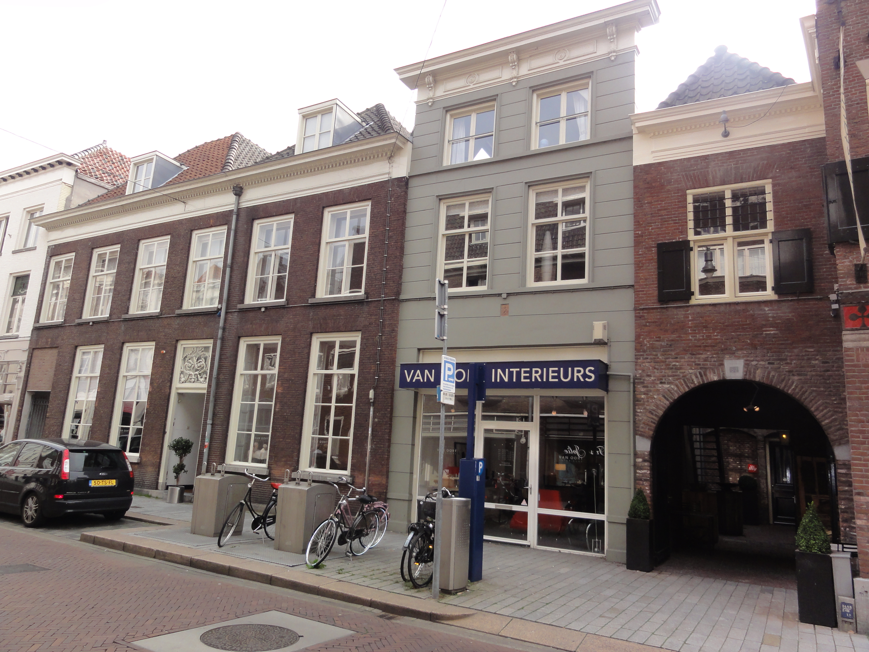 's-Hertogenbosch Rijksmonument 21926 Vughterstraat 98, 100, 102 75″ N, 5° 17′ 57.83″ E Object location51° 41′ 11.7″ N, 5° 17′ 58.6″ E